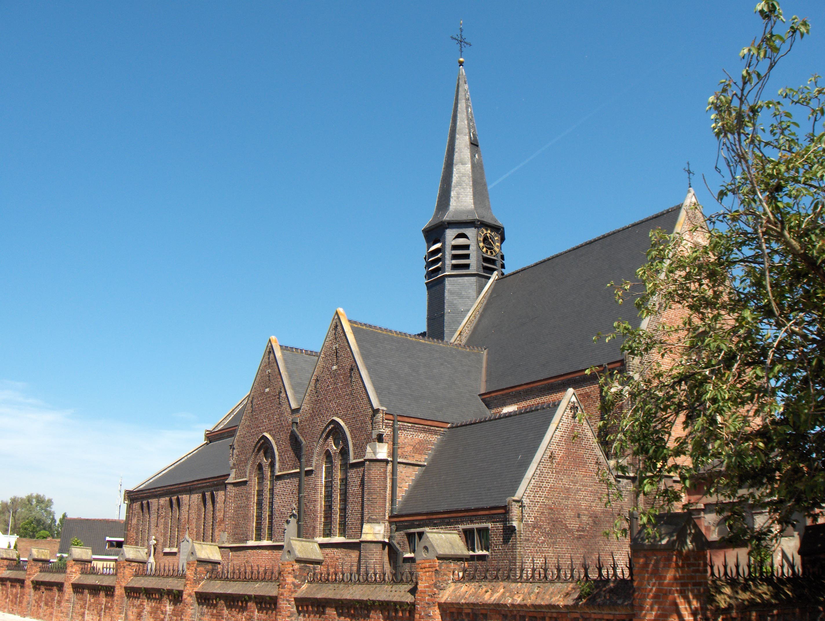 Beschreibung